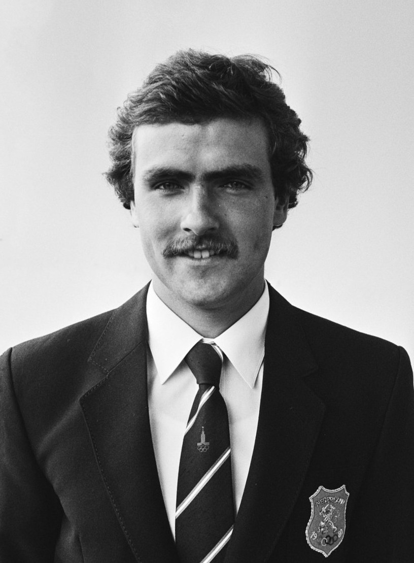 Vertrek Olympische schuttersploeg van Schiphol naar de zomerspelen in Moskou. Nieuwenhuizen